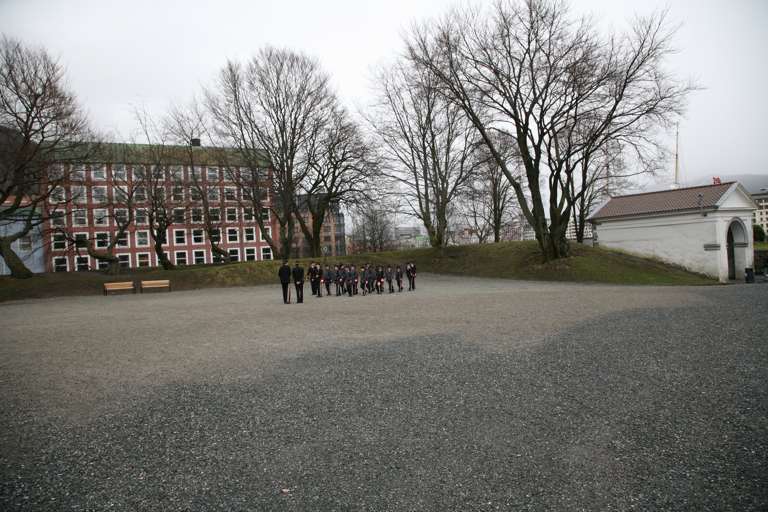 Bergenhus festning